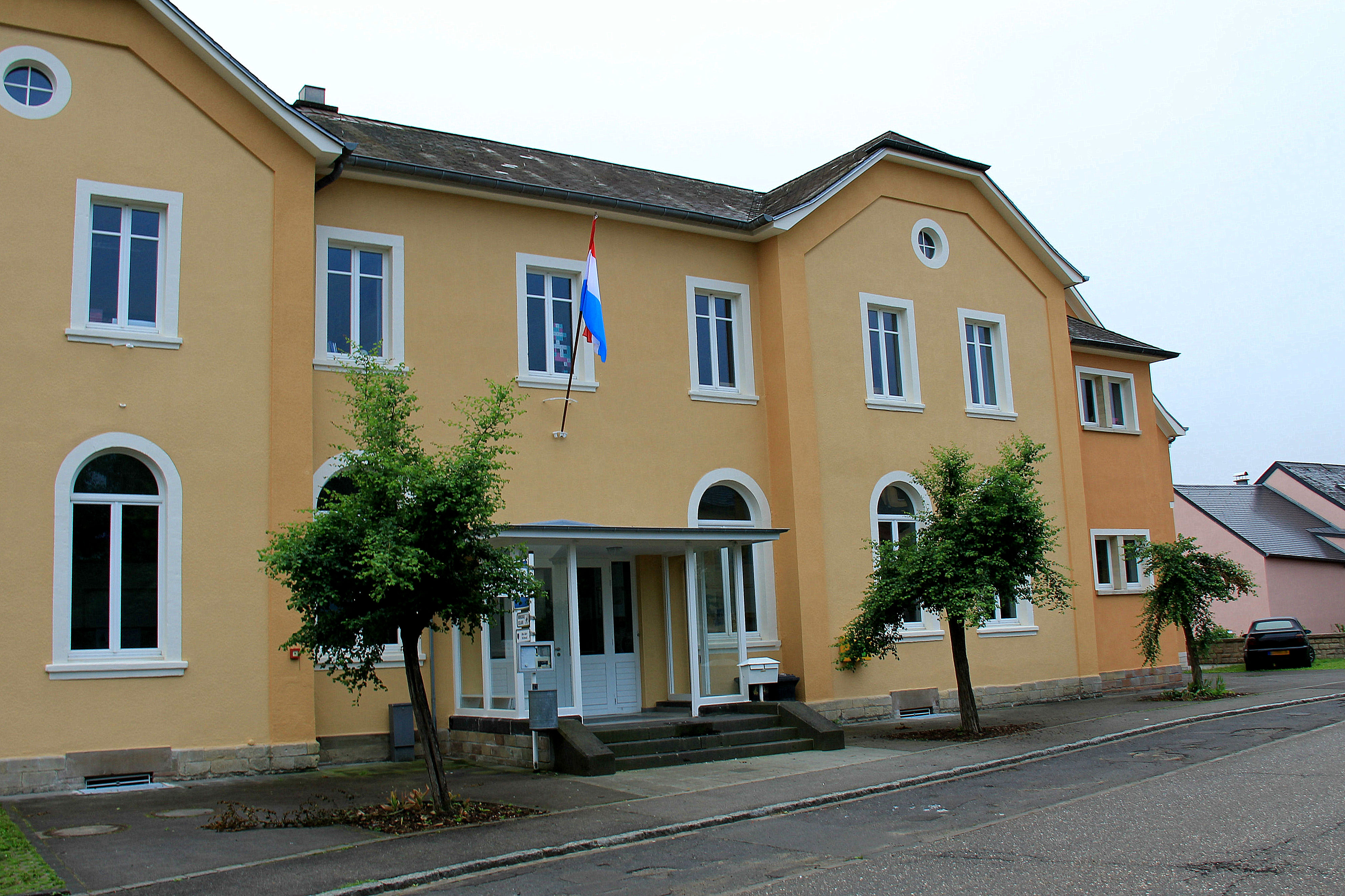 D'Schoul zu Ielwen um Virowend vu Nationalfeierdag 2013